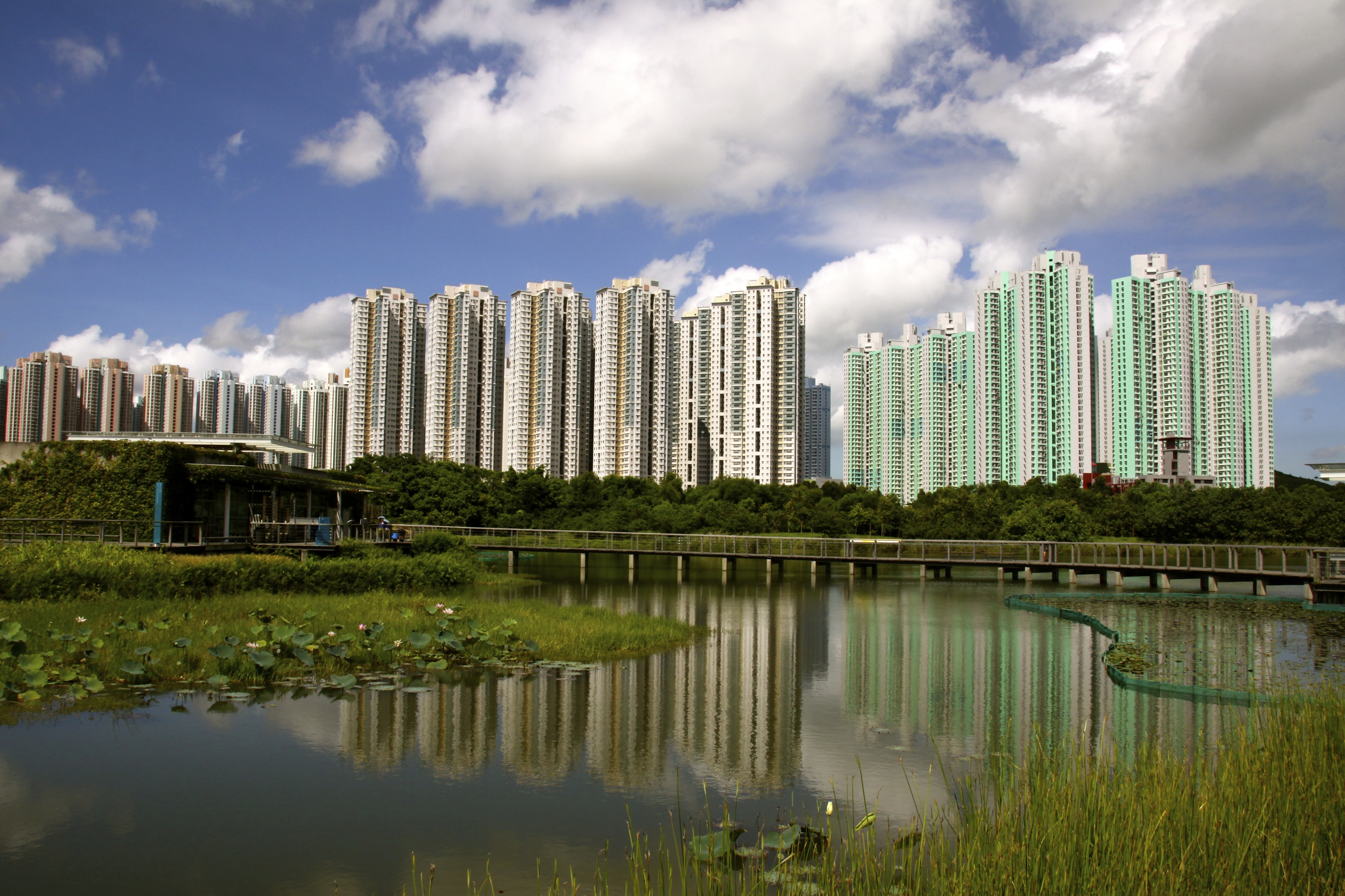 Hong Kong Wetland Park